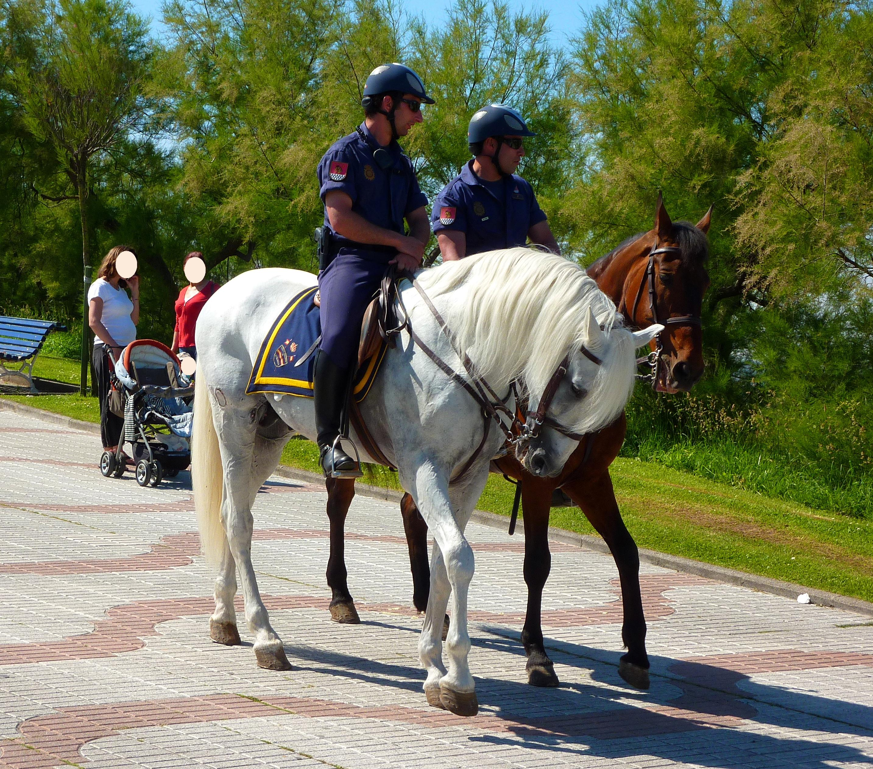 Policías Nacionales a caballo.